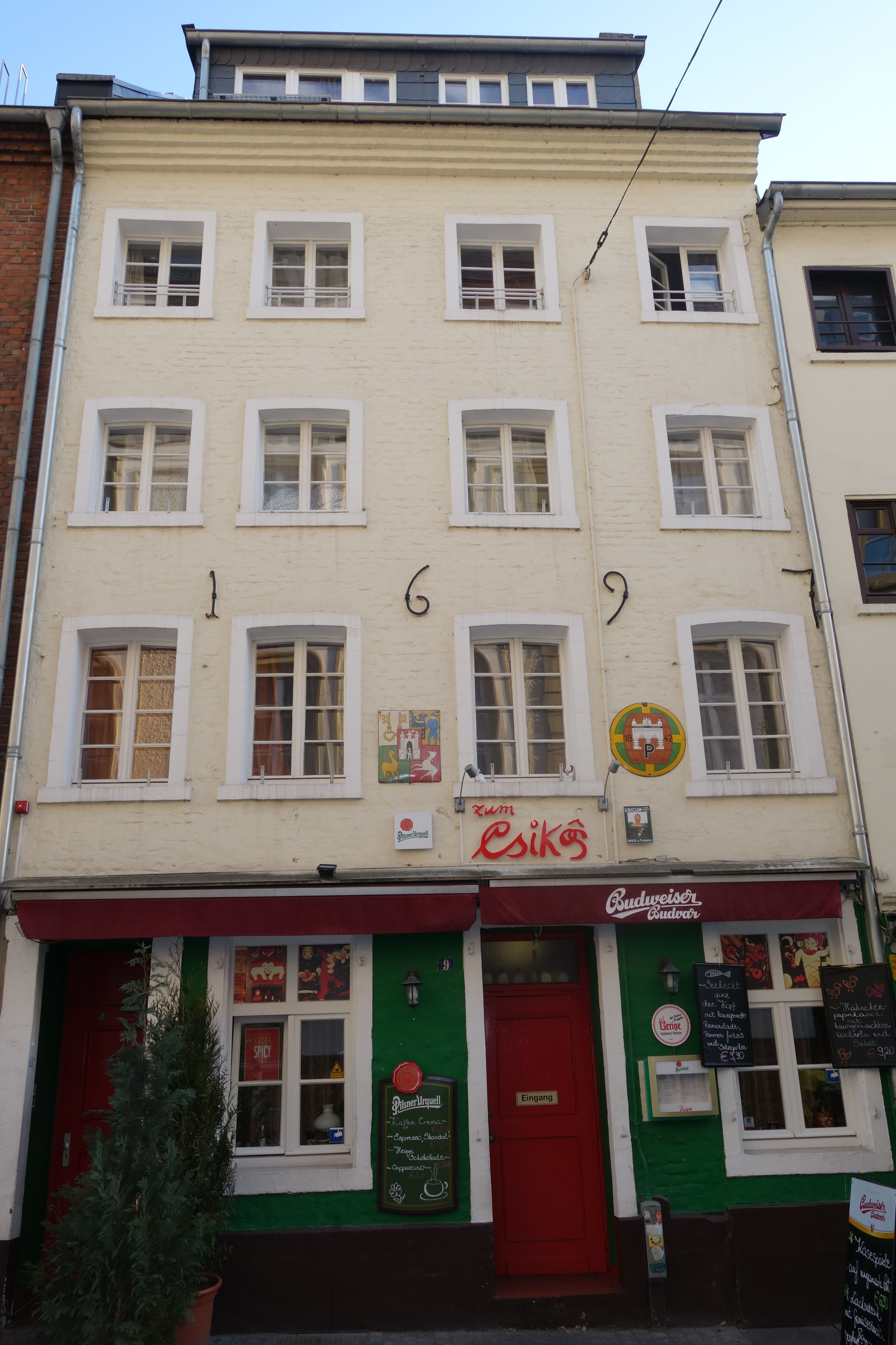 Düsseldorf, Andreassraße 7–9, Restaurant Zum Csikos, März 2015.